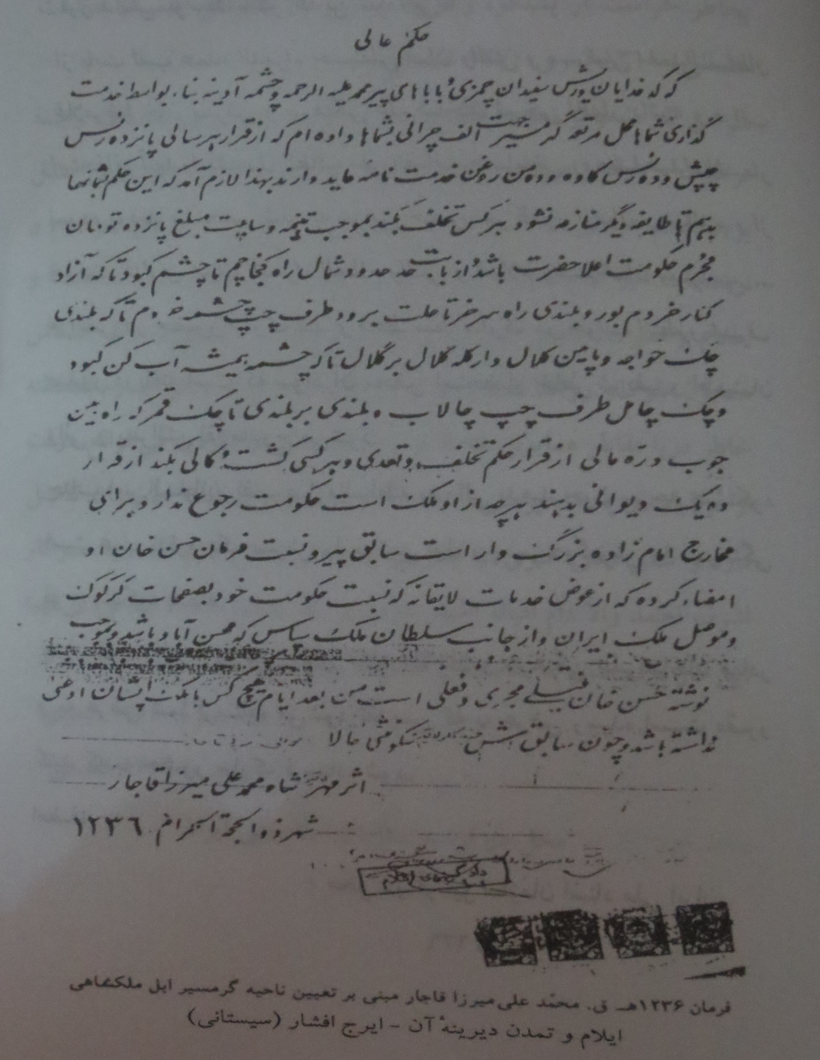 سند فتح نامه پهلوان موسی خمیس گرزدین وند و ایل ملکشاهی اعطایی فتحعلی شاه قاجار از سوی شاهزاده محمد علی میرزا قاجار به پاس غلبه بر سپاه امپراتوری عثمانی